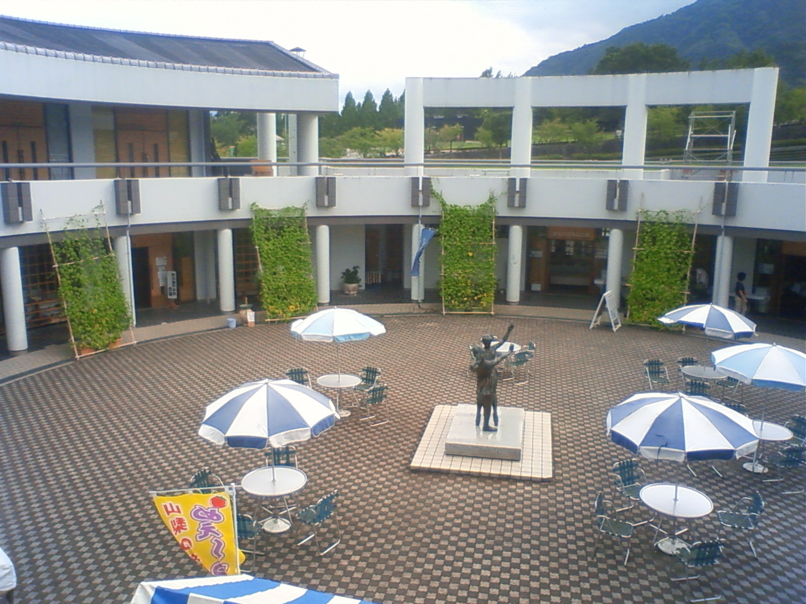 道の駅富士川ふるさと工芸館は筒状の建物で、その内部の様子。Panoramioより転載。